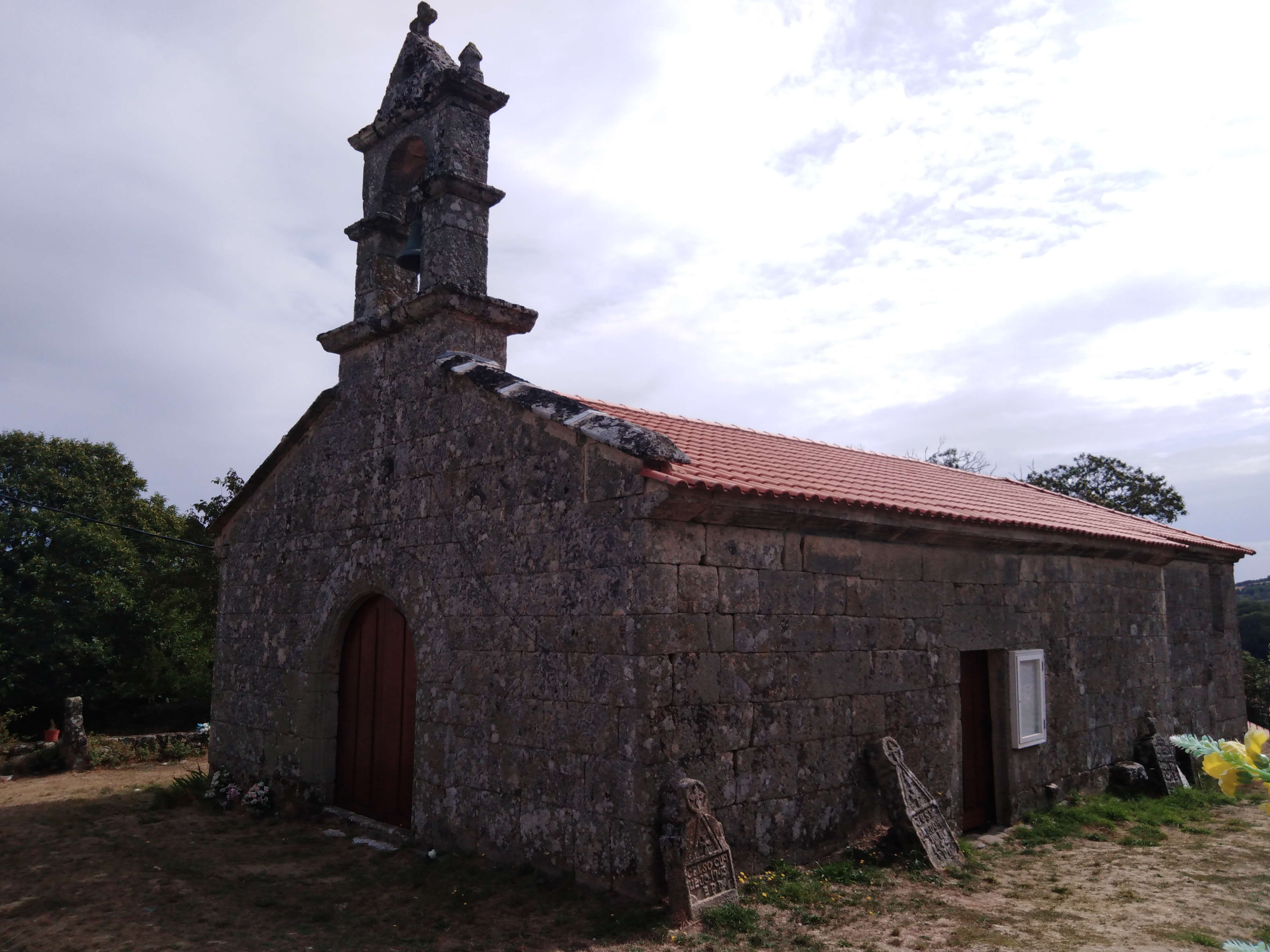 Igrexa de Santa María de Guntín (Os Blancos)